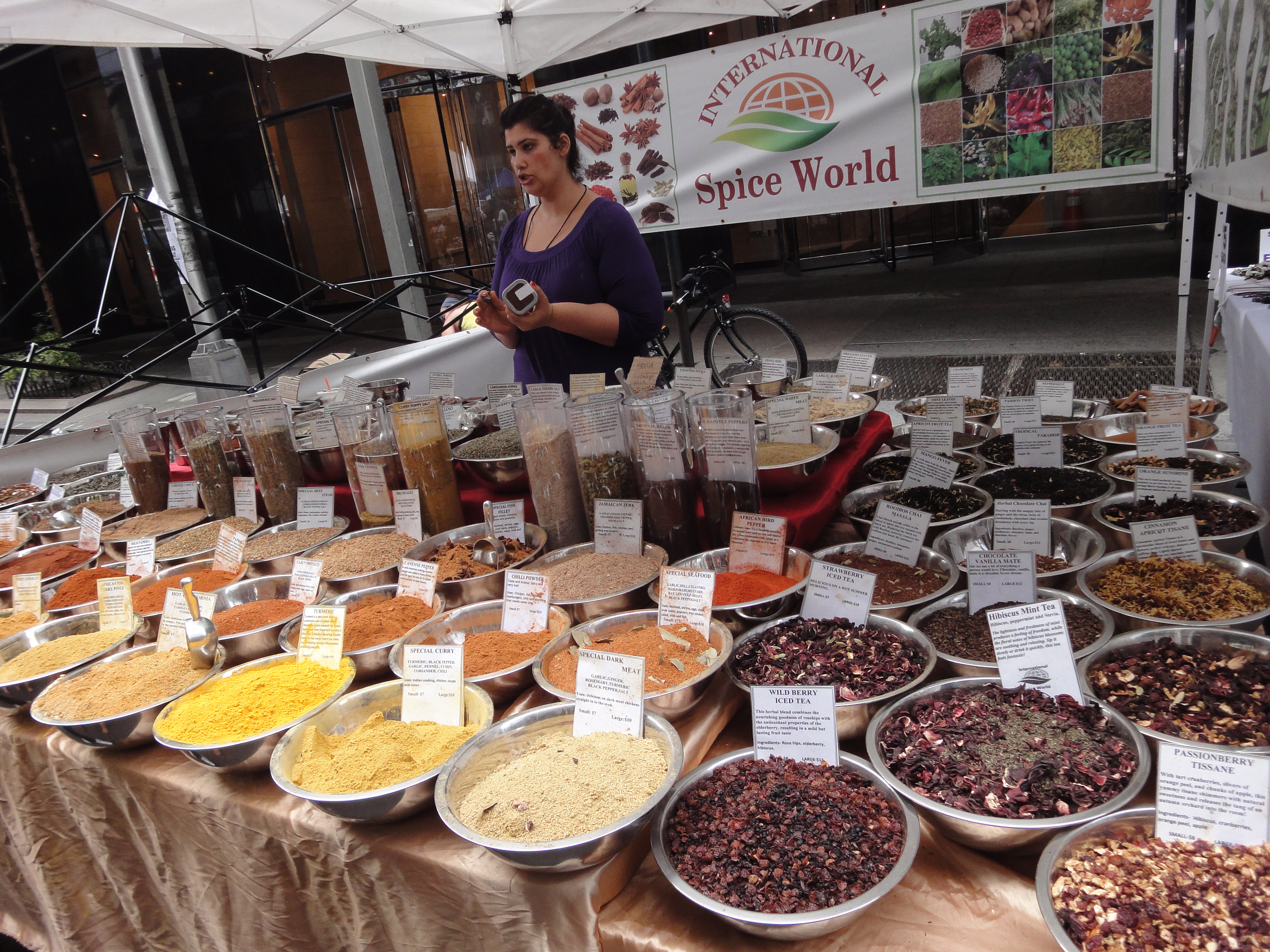 Marchand d'épices à New York